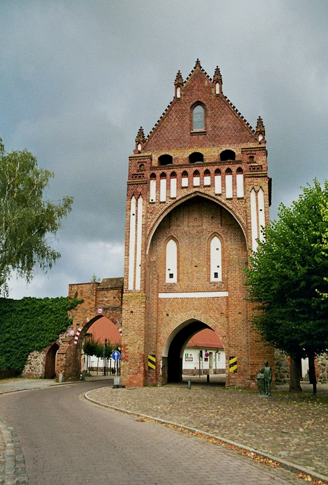 Source: made by WikiTour 2005 Description: Gransee: Das aus dem 15. Jahrhundert stammende Ruppiner Tor ist ein Wahrzeichen der Stadt. Blick von außerhalb der Stadtmauern, von der Ruppiner Straße aus.